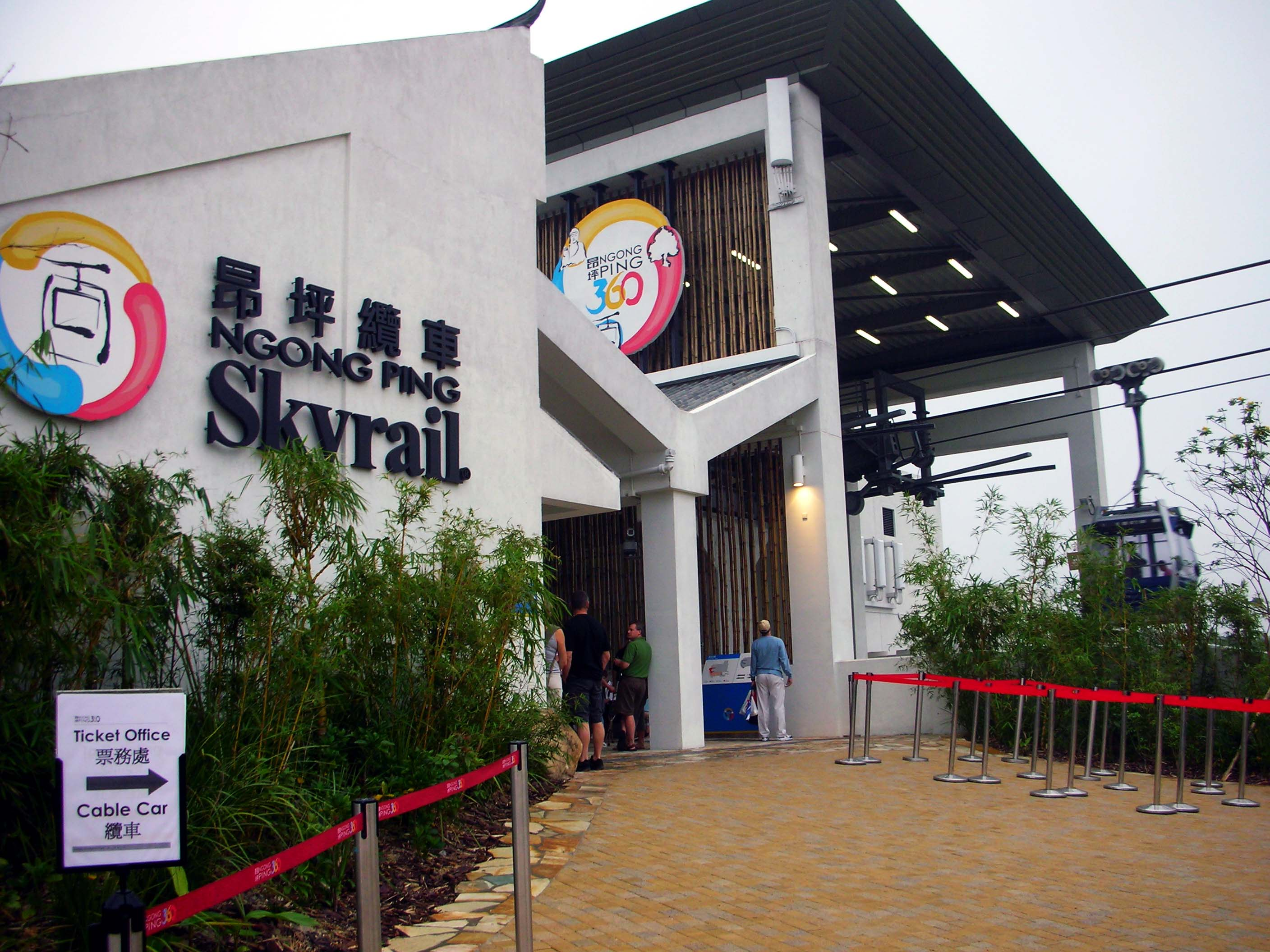 Ngong Ping 360 Hong Kong, Ngong Ping Terminal.